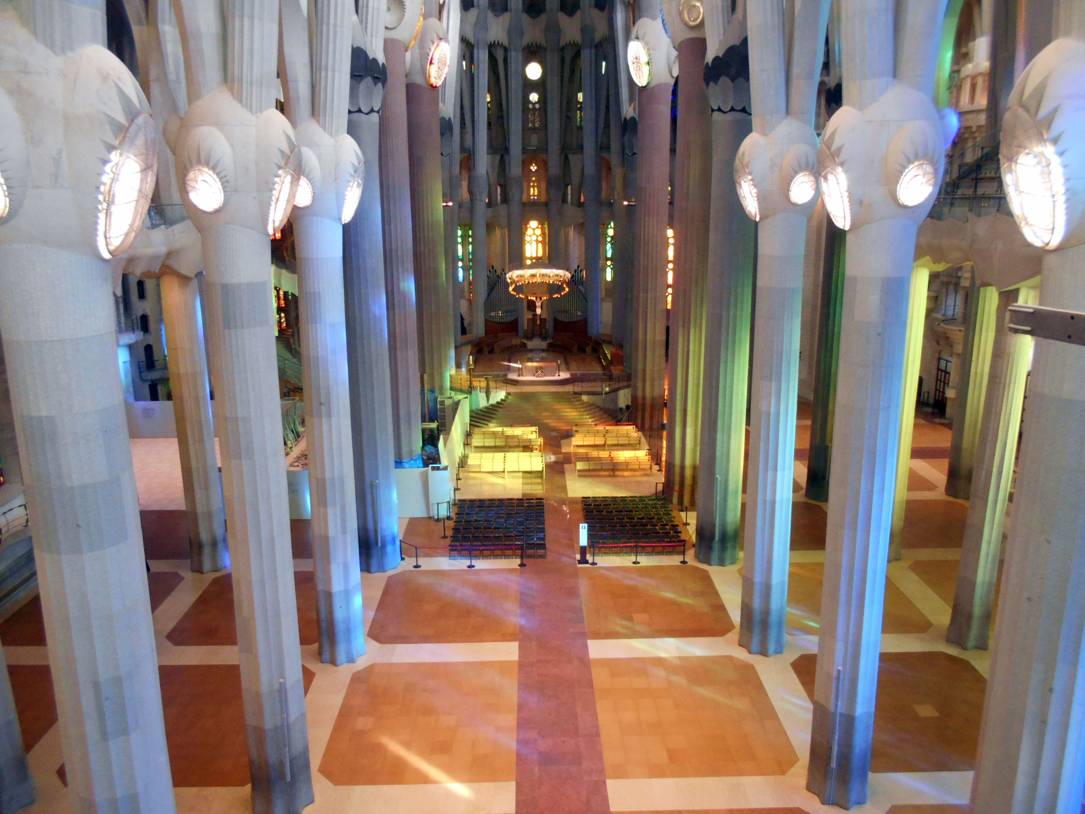 Interior de la Sagrada Familia.